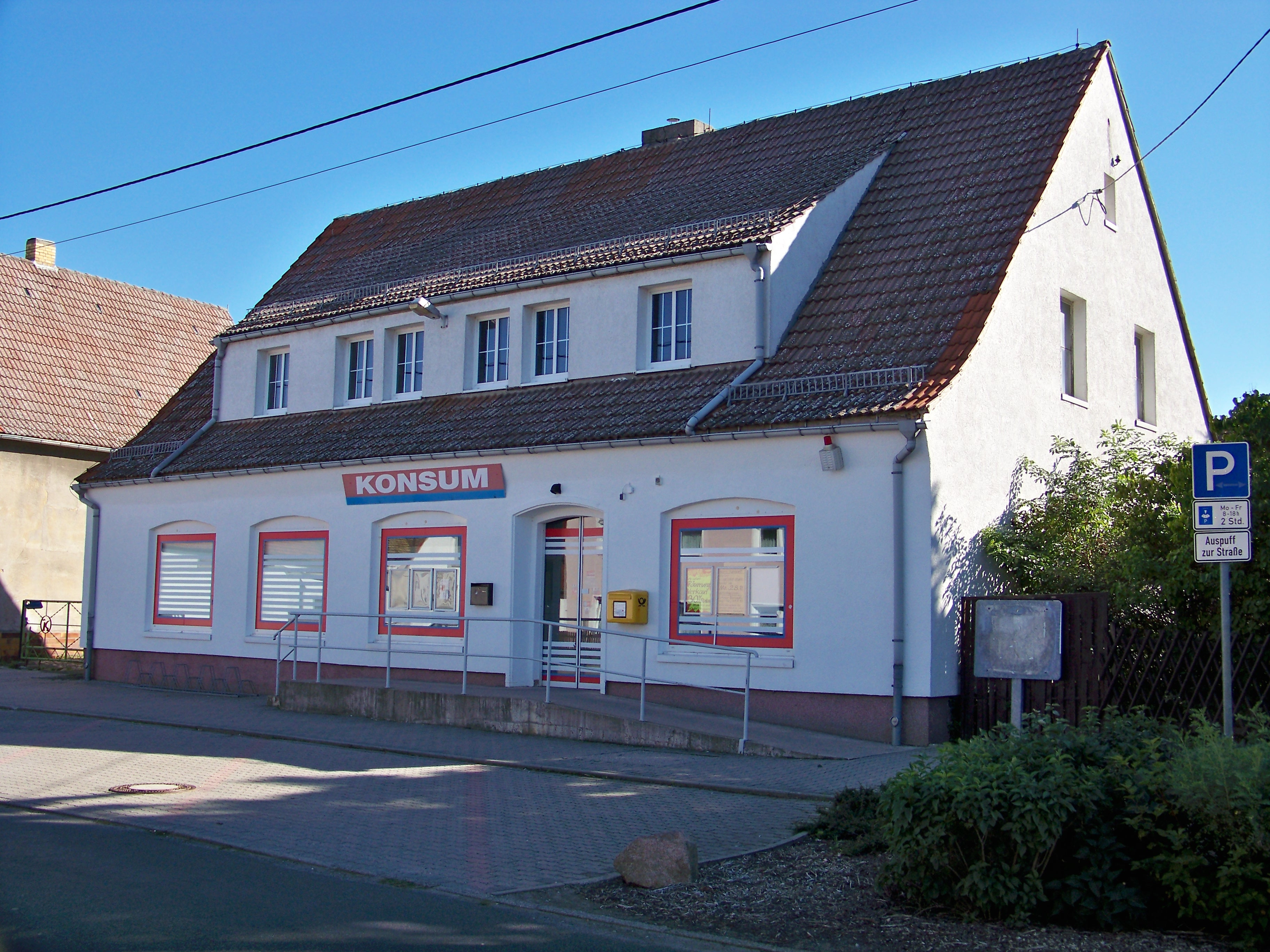 Im Zuge der Insolvenz geschlossene Konsumverkaufsstelle der Konsumgenossenschaft Sachsen-Nord in Sitzenroda